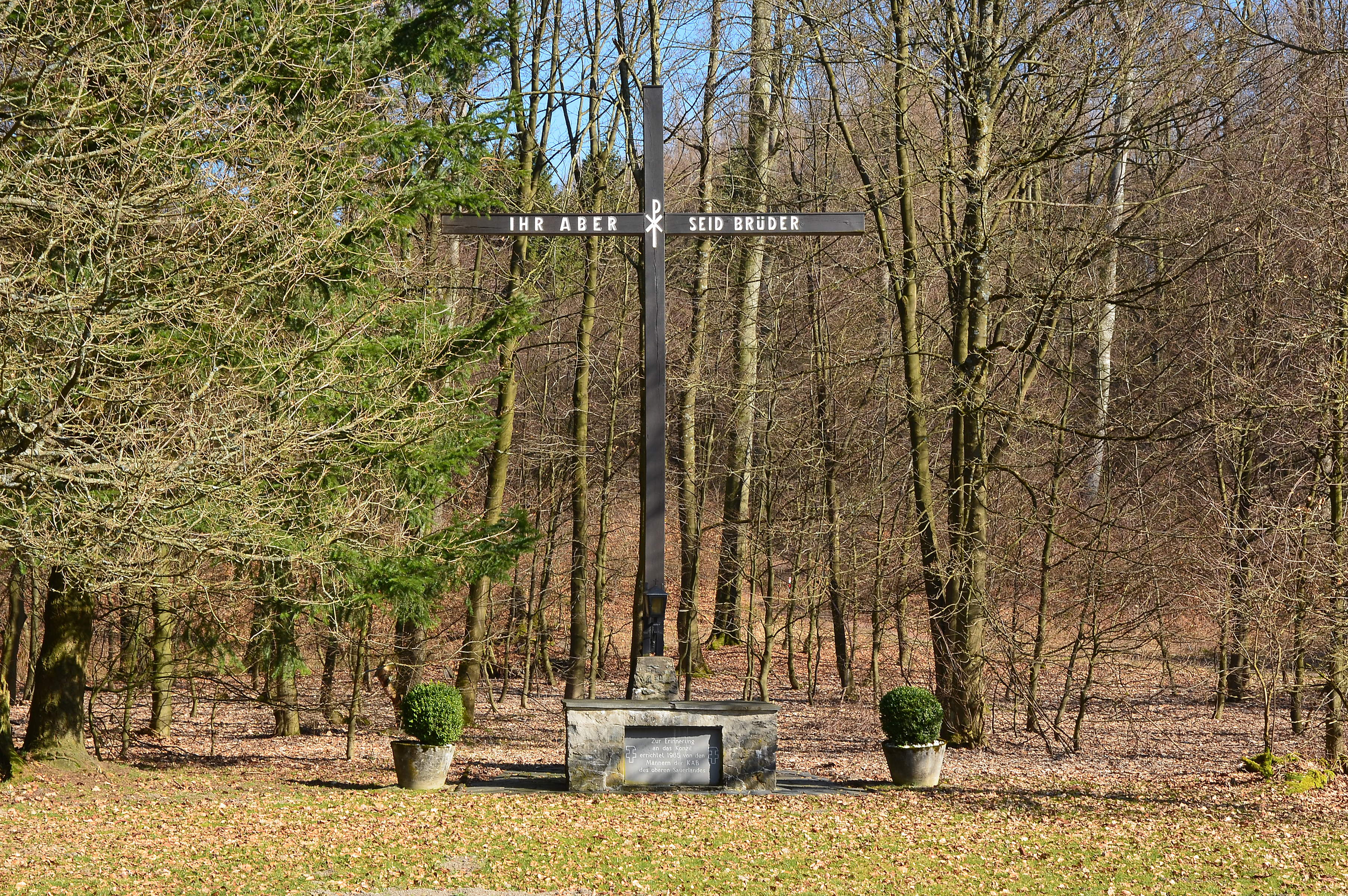 Brilon, Borberg, das Friedenskreuz im Bereich der Wallanlage